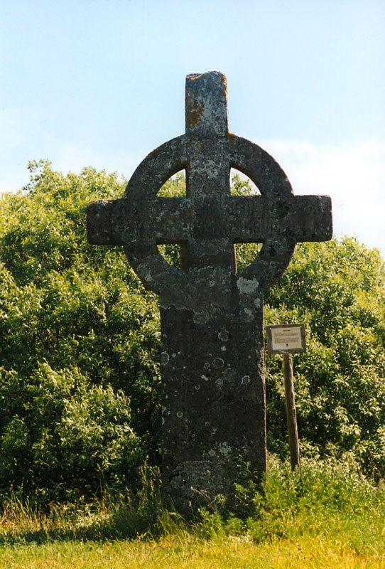 stenkors